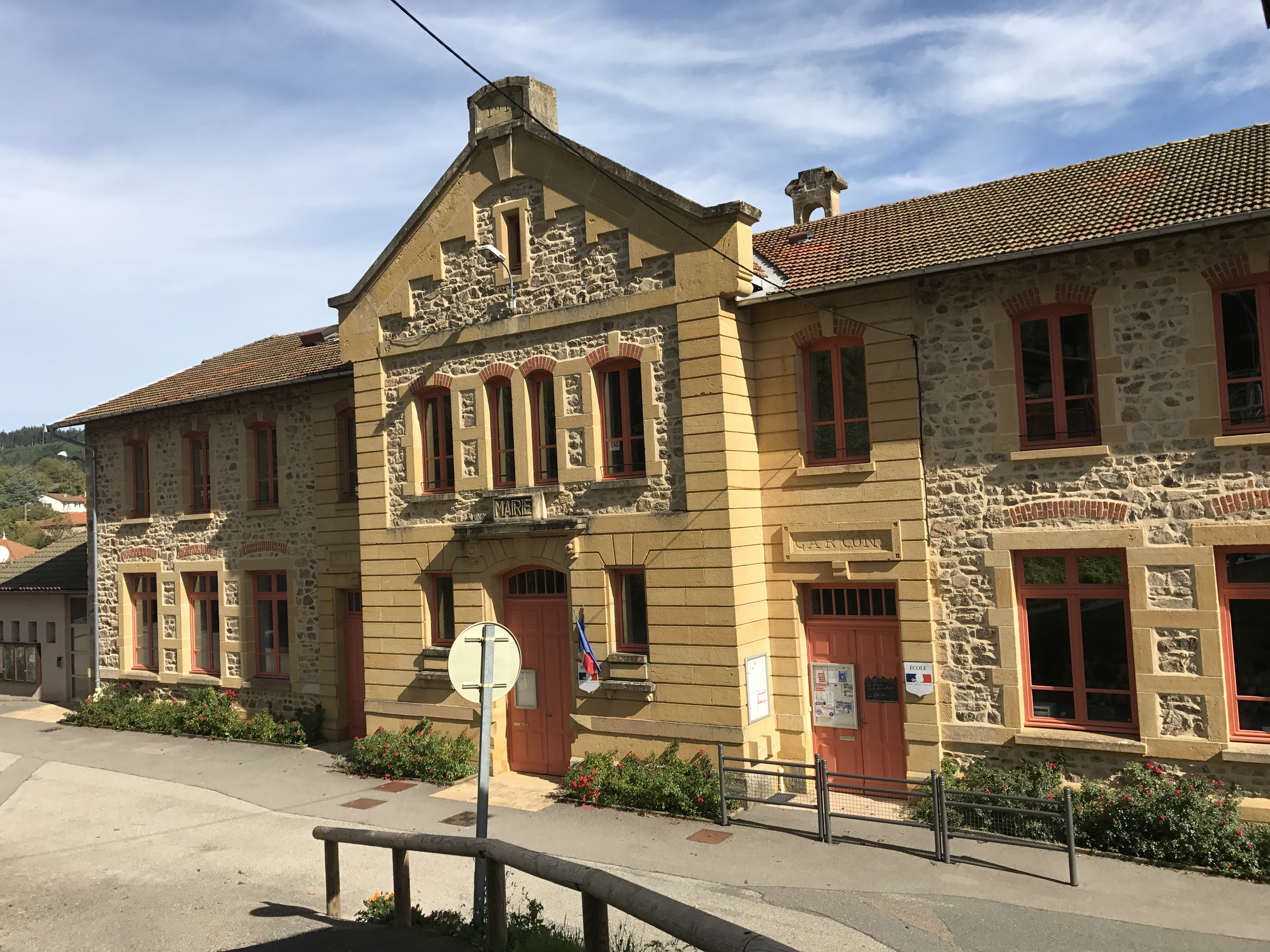 Image de Saint-Bonnet-le-Troncy en octobre 2017.